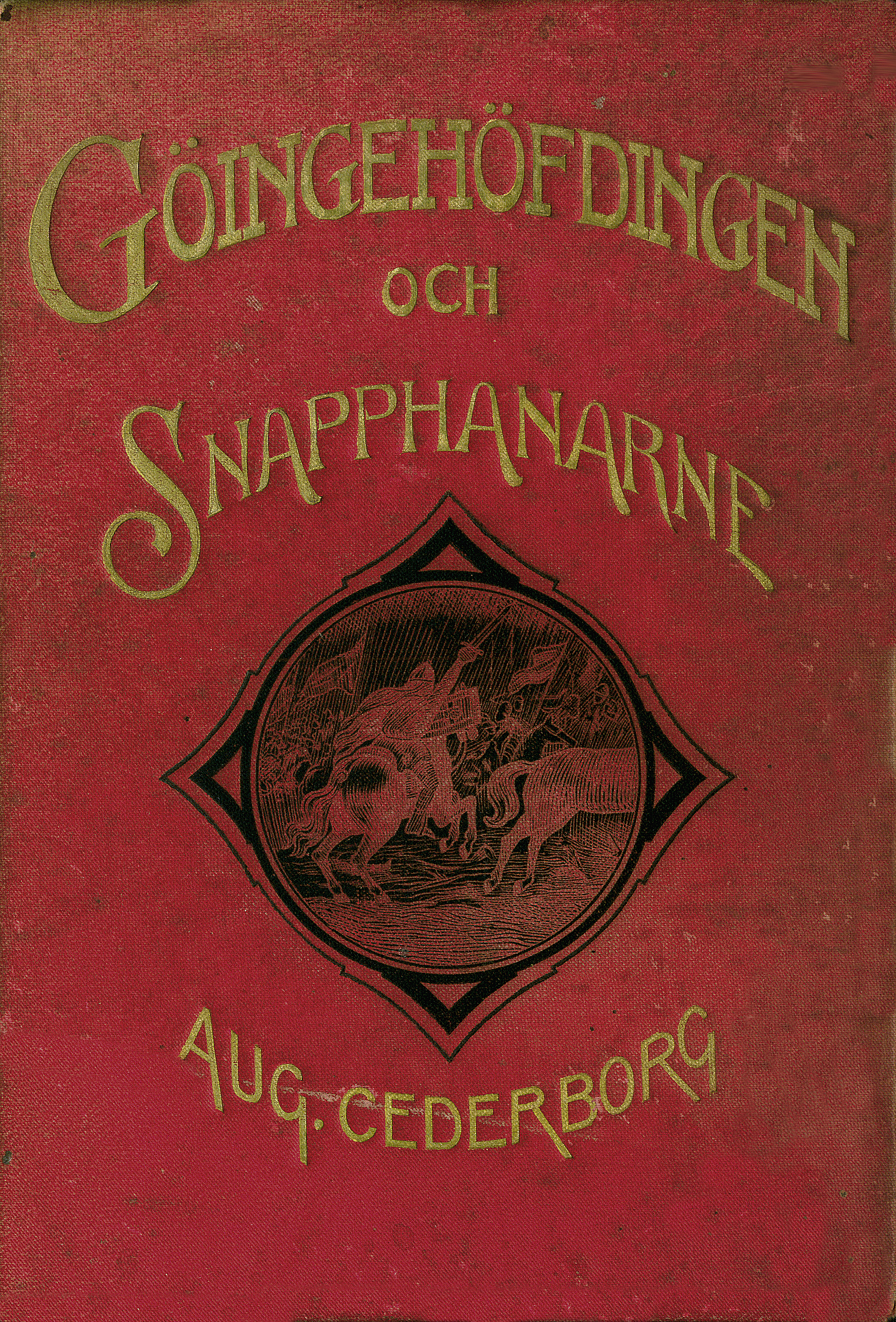 Cover of Göingehöfdingen och snapphanarne by August Cederborg (1849-1933)